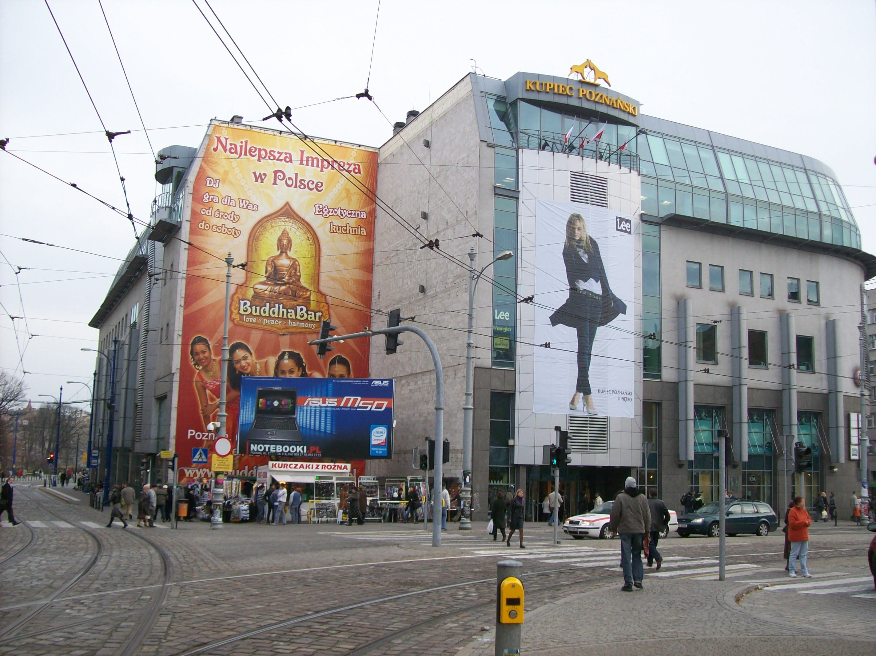 Centro Comercial Kupiec Poznański en Poznan, Polonia.